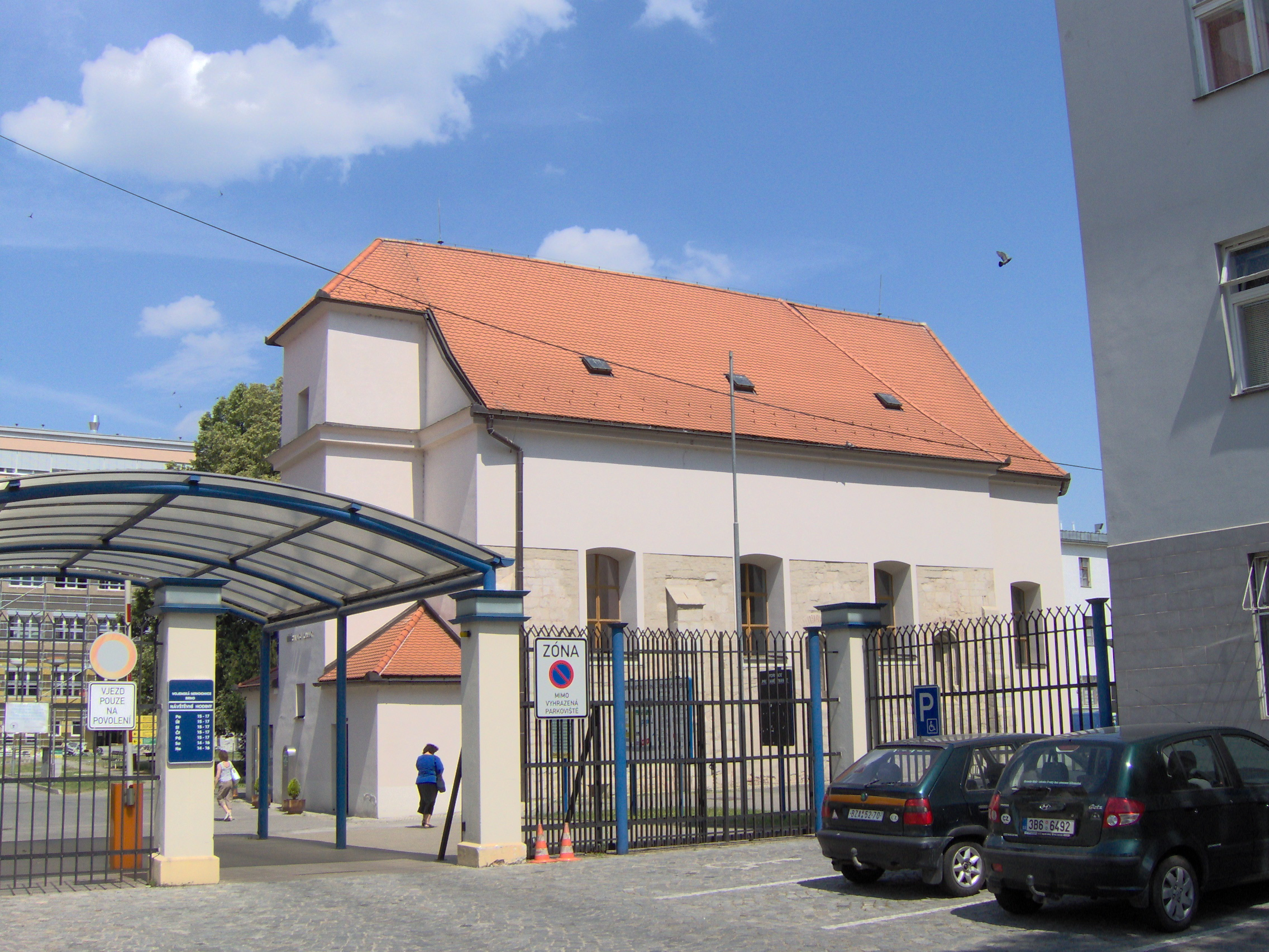 Kostel svaté Kunhuty v areálu Vojenské nemocnice v Brně